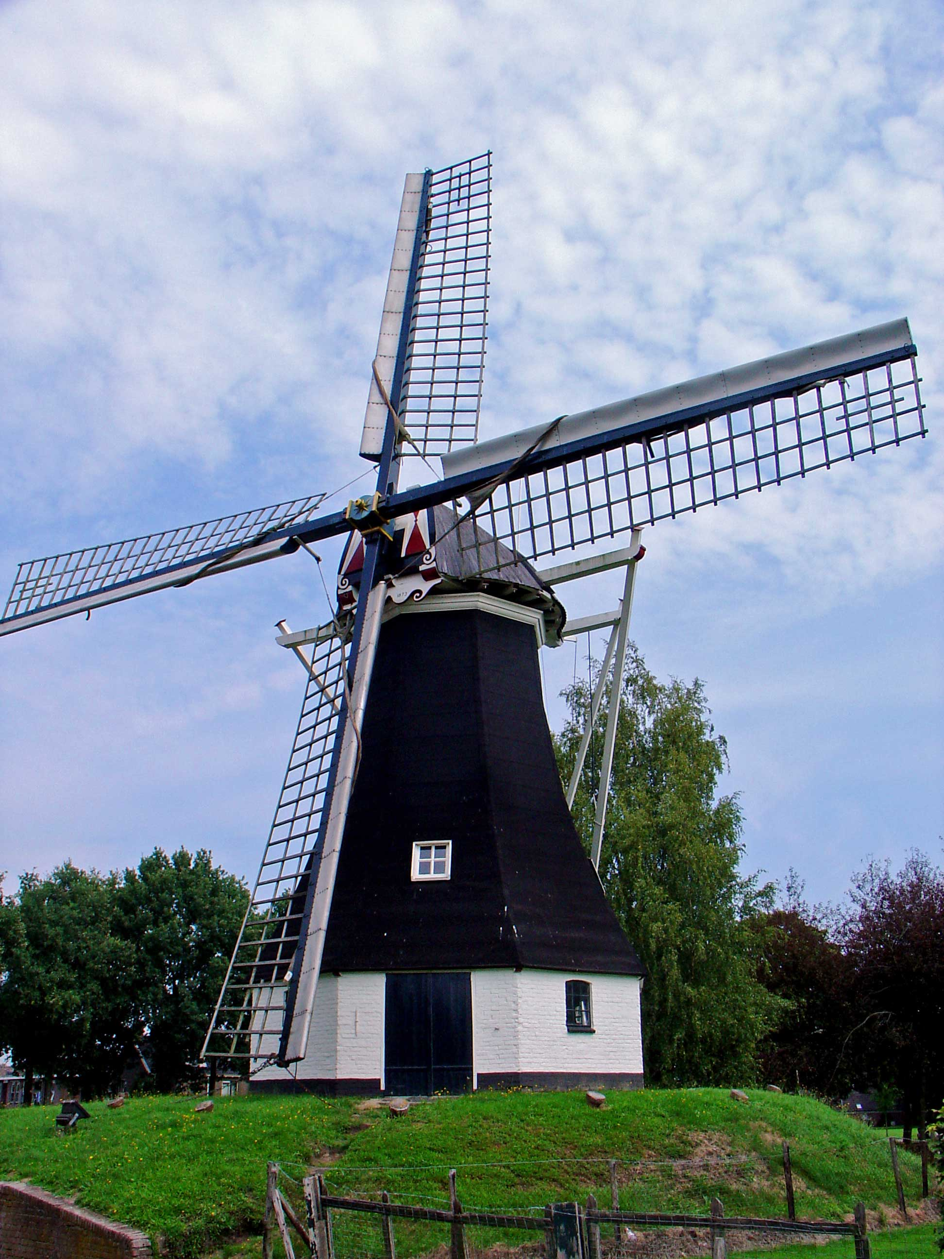 De molen van Rolde